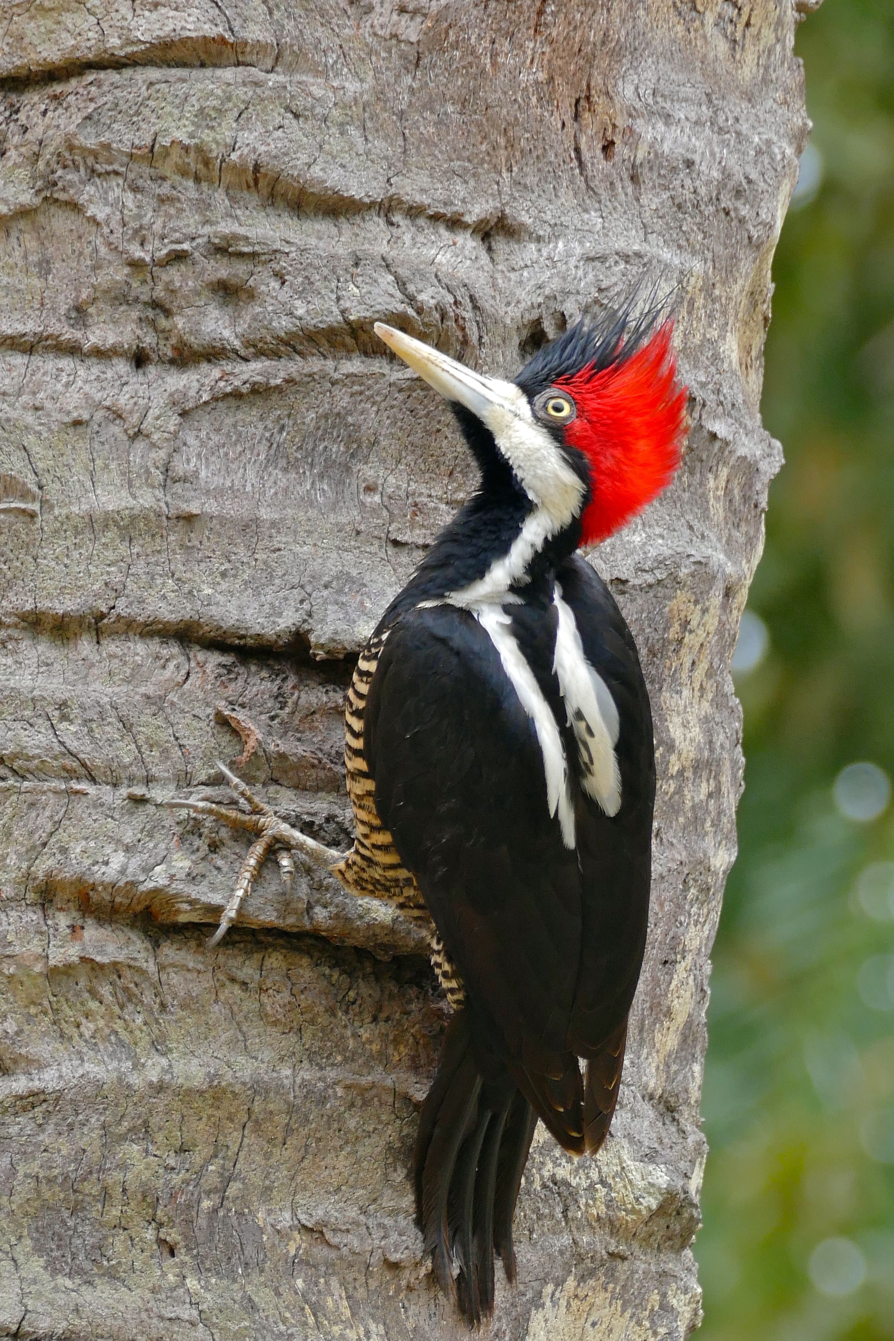 Pouso Alegre, Transpantaneira, Poconé, Mato Grosso, BRAZIL